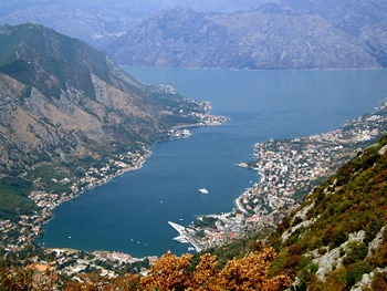 D'Bucht vu Kotor am Montenegro - d'Alstad ass ënne riets.